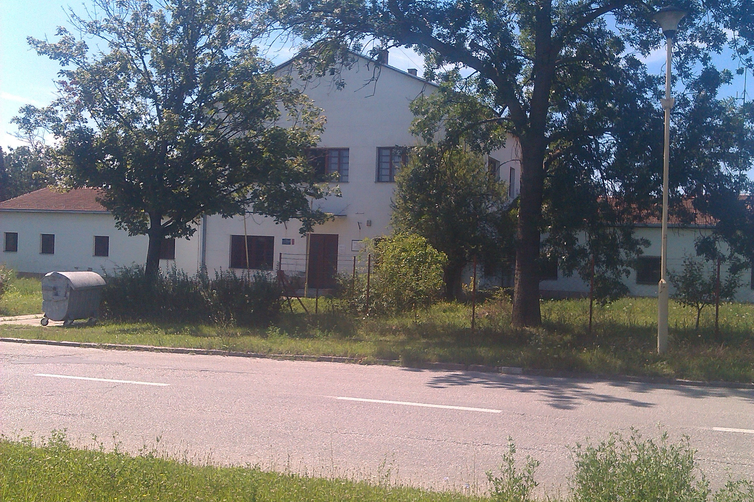 Srpski (latinica): Istorijski arhiv Šumadije u Kragujevcu